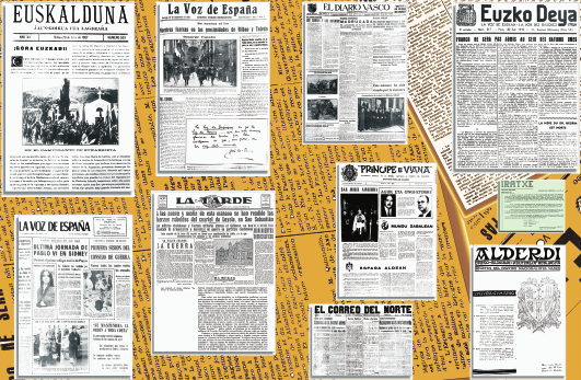 Prentsarentzat mozala. 1936-1976